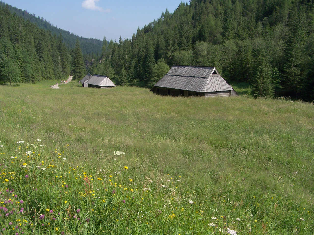 Polana Jaworzynka (Tatra Mountains)